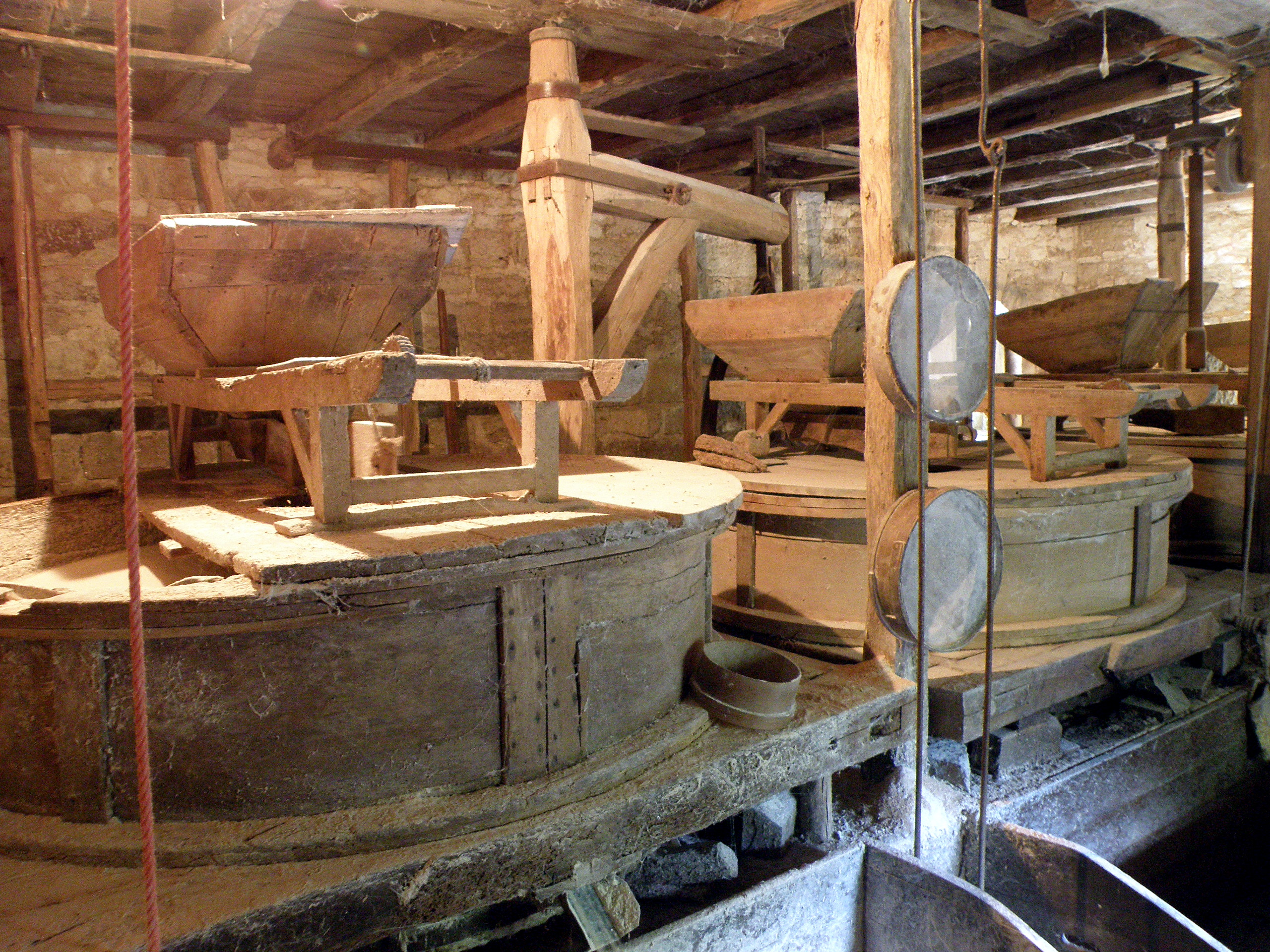 Calès, commune du département du Lot (région Midi-Pyrénées, France). Moulin à eau de Cougnaguet (ou de Cognaguet ― selon la Base Mérimée ― ou de Caugnaguet ― graphie retenue par l’IGN), sis sur la rive droite de la rivière Ouysse, affluent gauche de la Dordogne. Salle des meules du moulin.